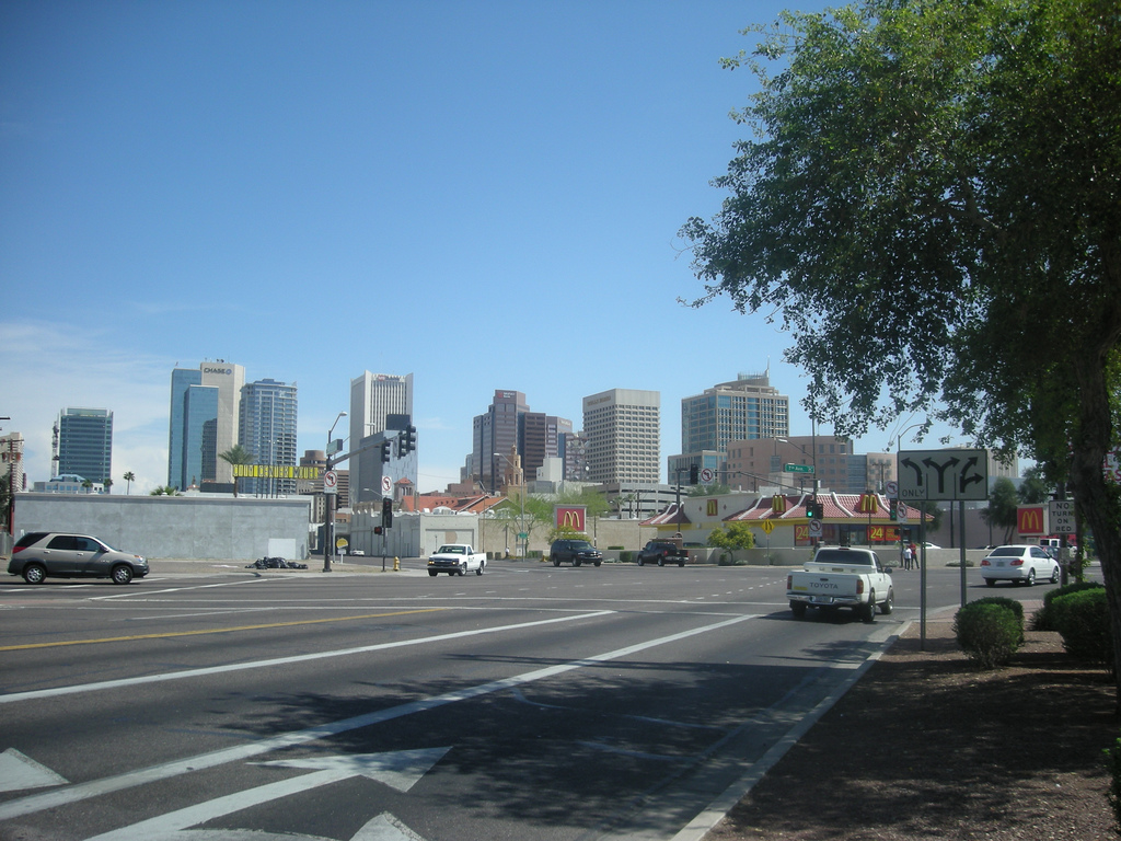 Skyline from Grand Ave